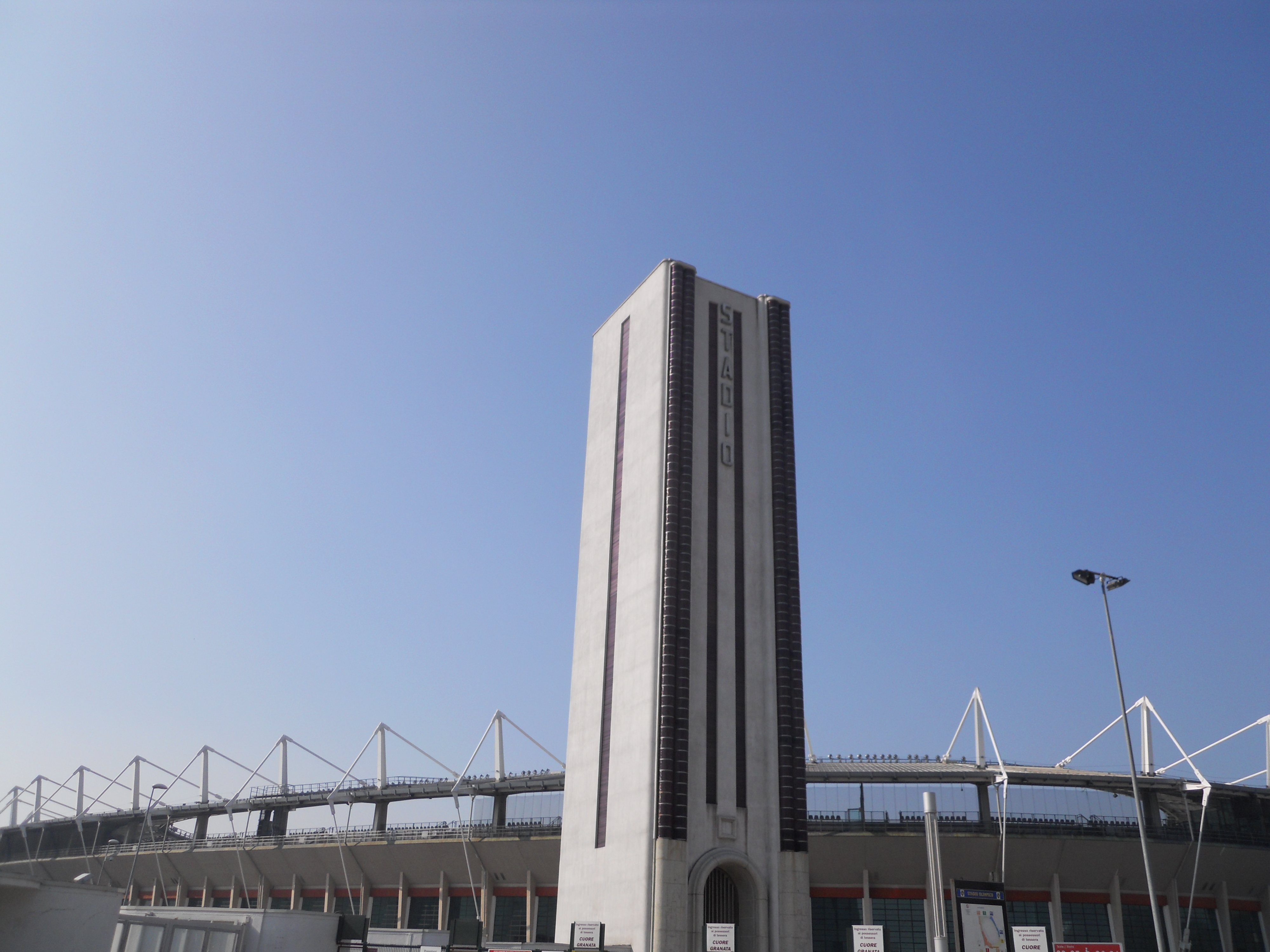 La Torre Maratona dopo i restauri